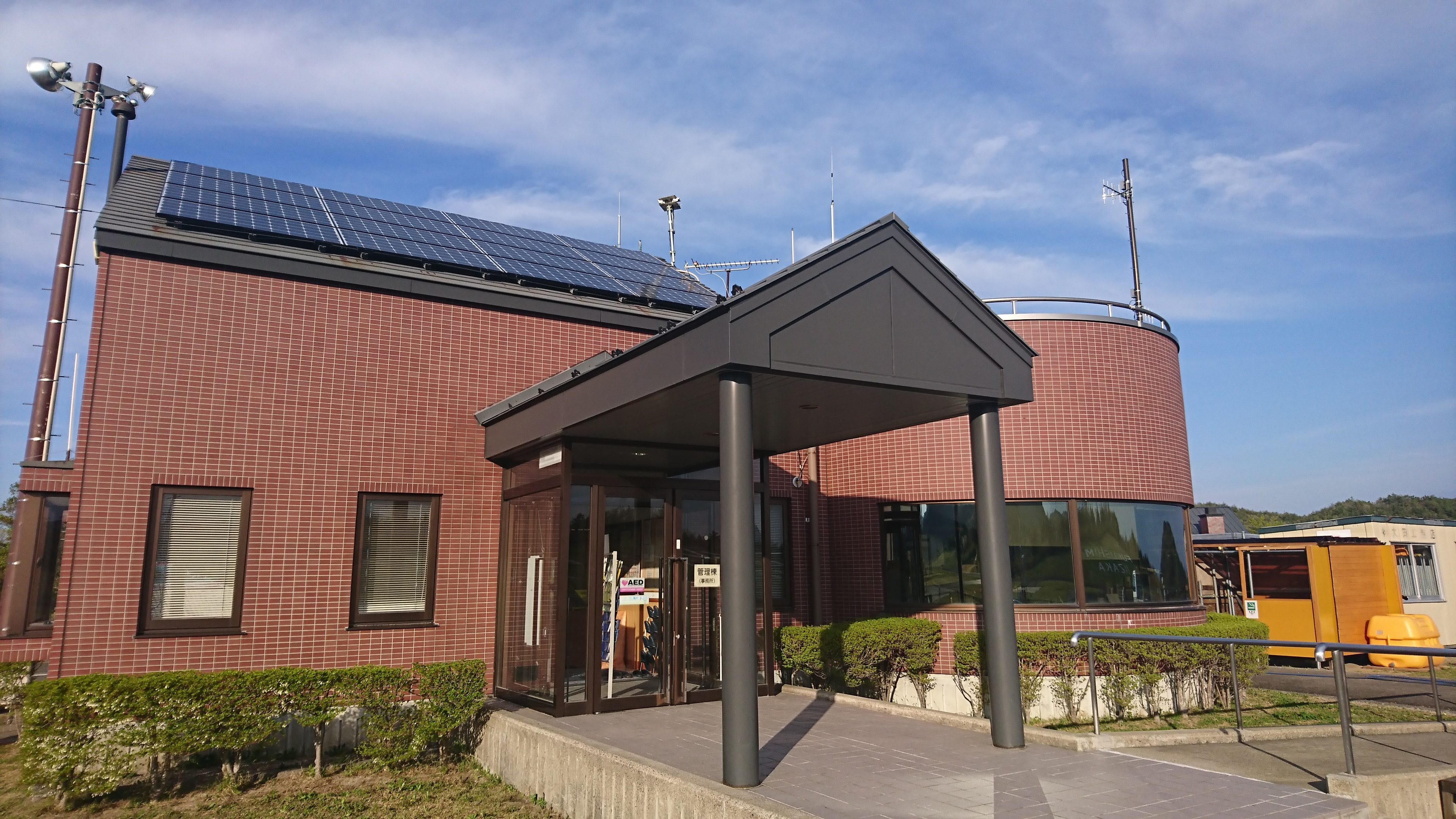 福島スカイパーク管理棟